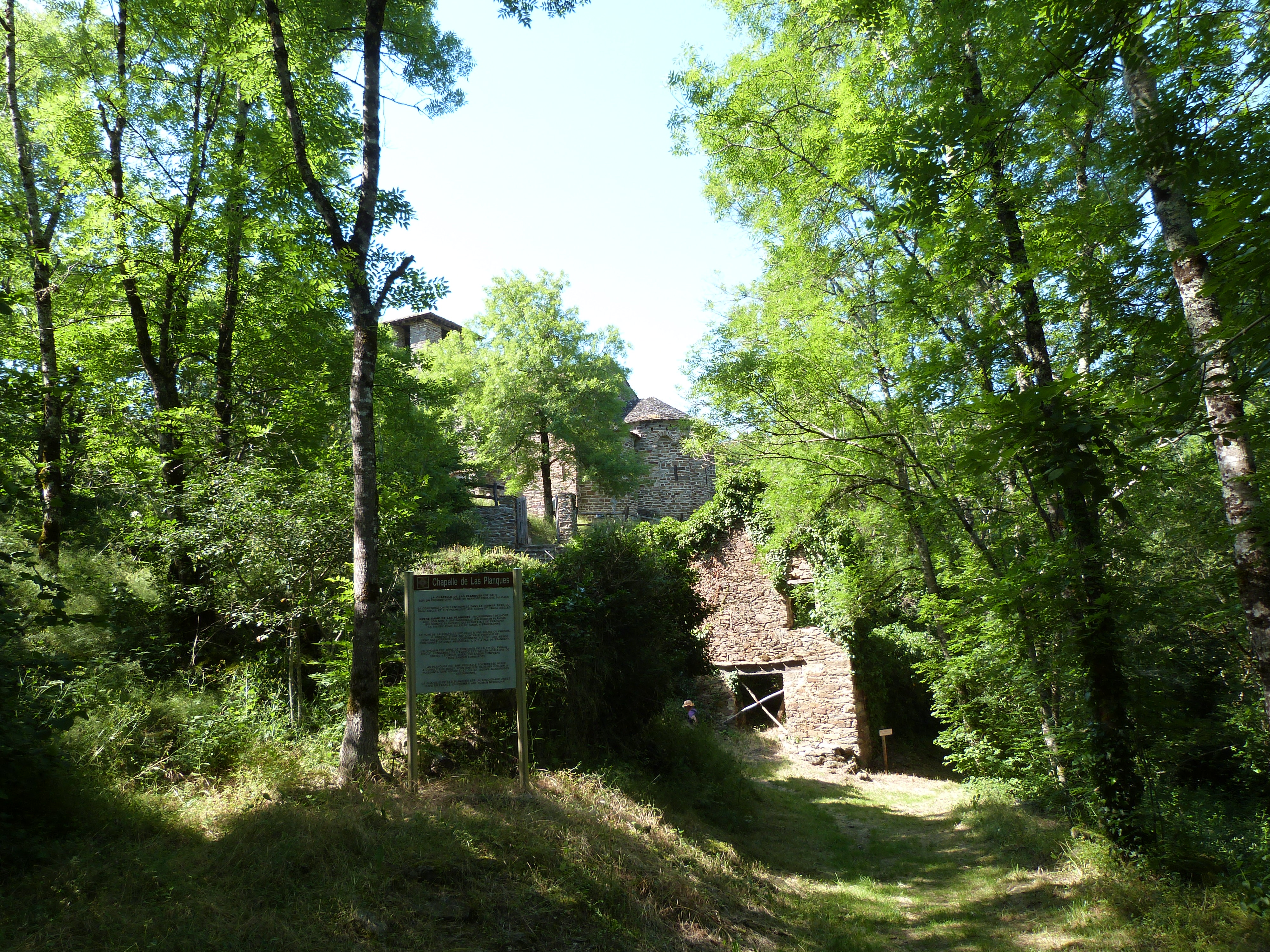 Église Notre-Dame-de-Lasplanques de Tanus, (Classé, 1913) Elle a été bâtie dans un lieu isolé, sur un promontoire dominant un méandre du Viaur .